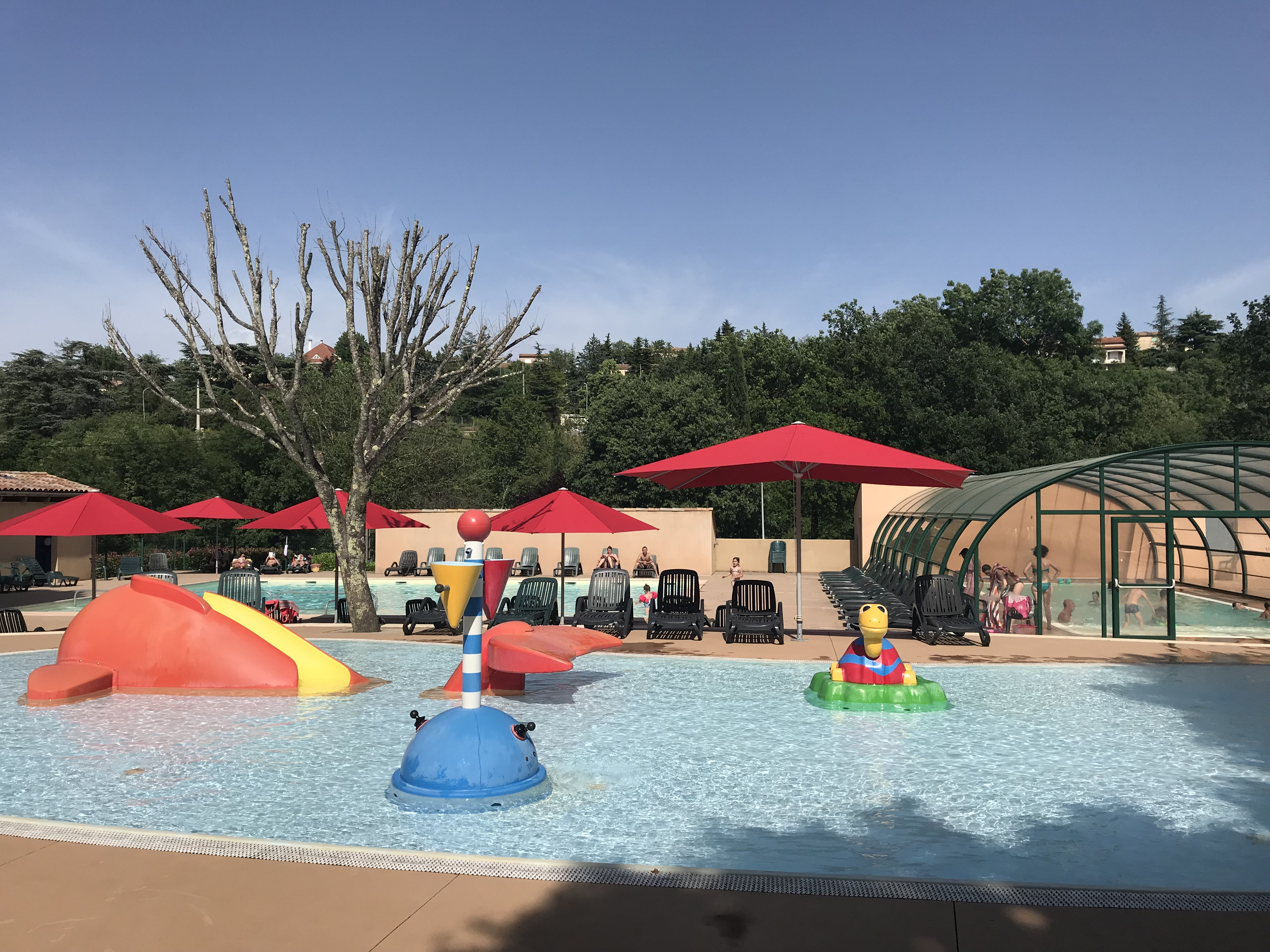 Ardèche Camping à Privas (Ardèche, France).